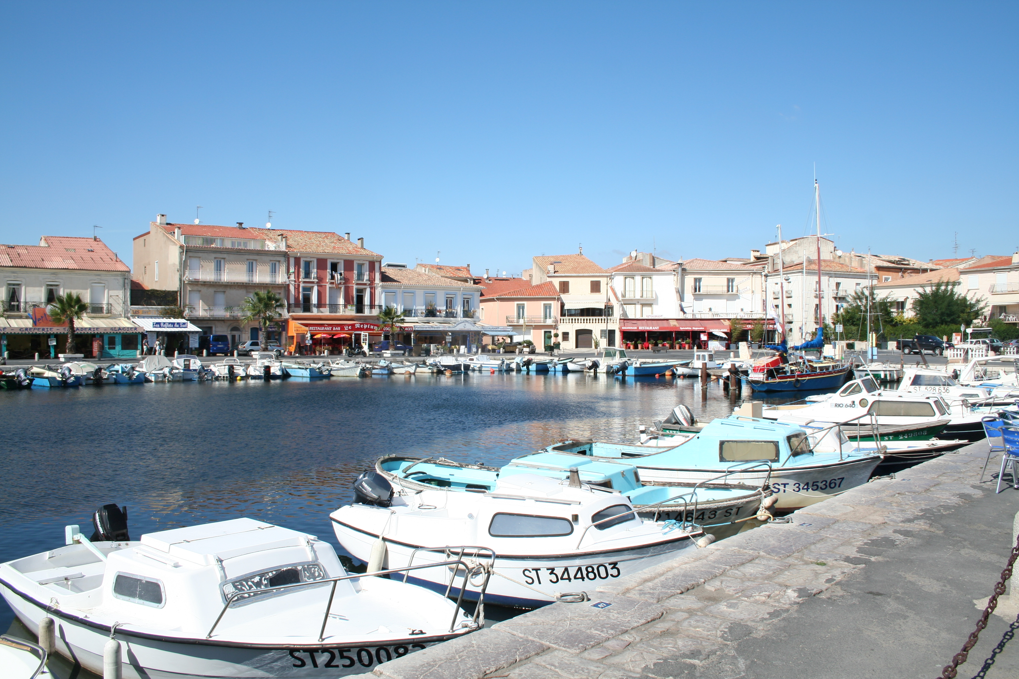 Mèze (Hérault) - Port.